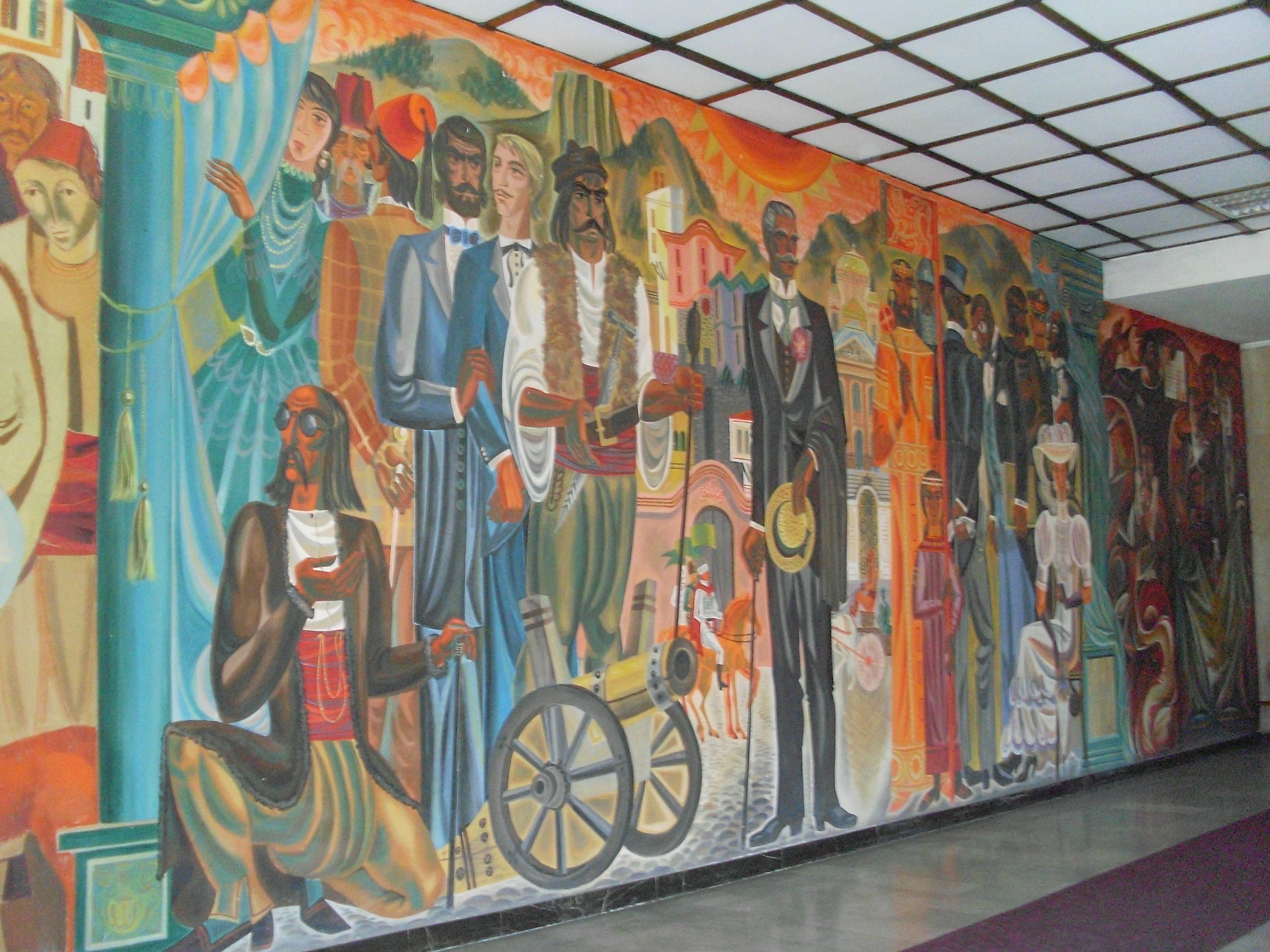 Mural en Biblioteca, personajes variados, Plovdiv, Bulgaria, 2011